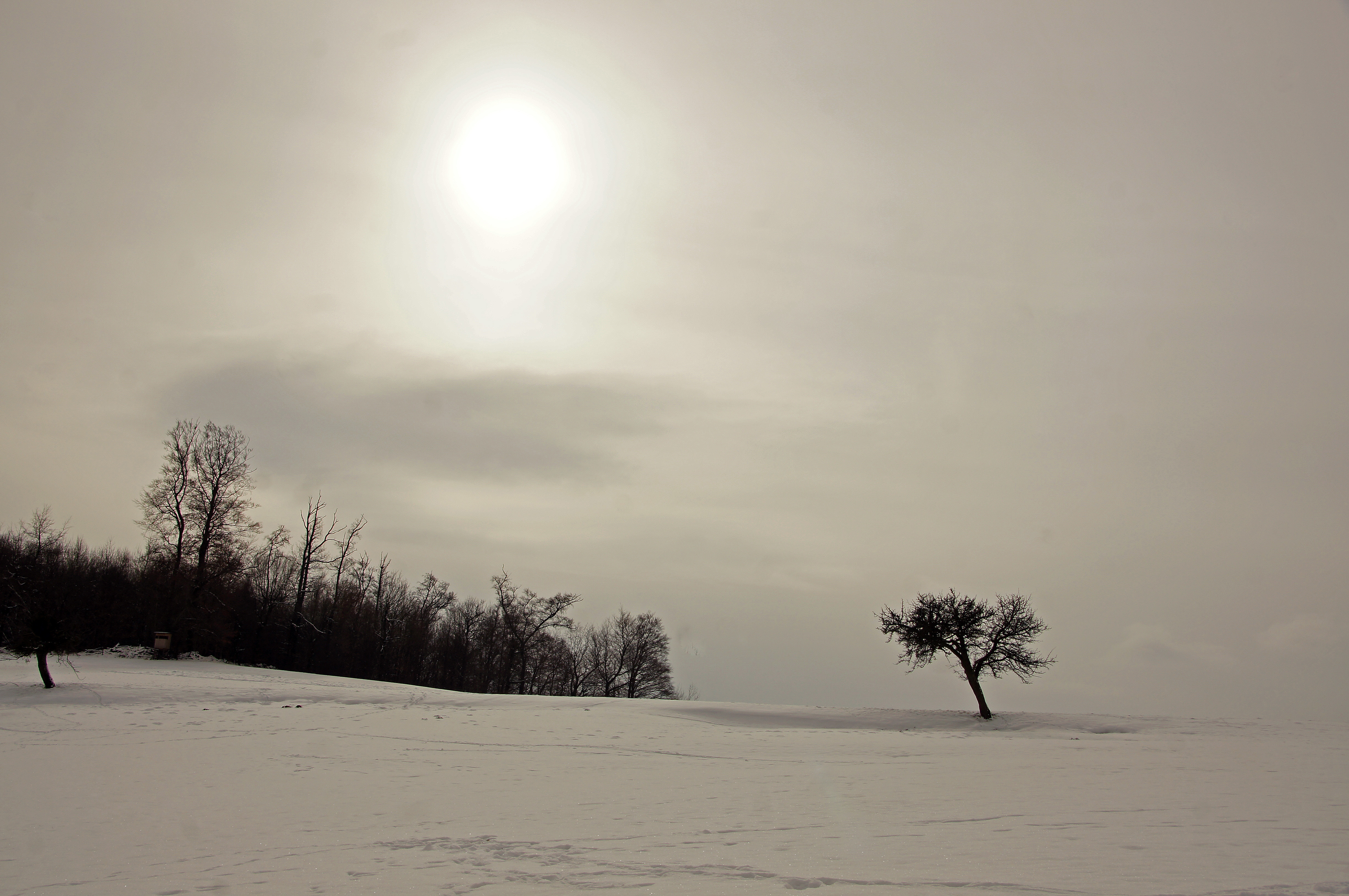 Winterlandschaft bei Lindenfels im Odenwald, Hessen